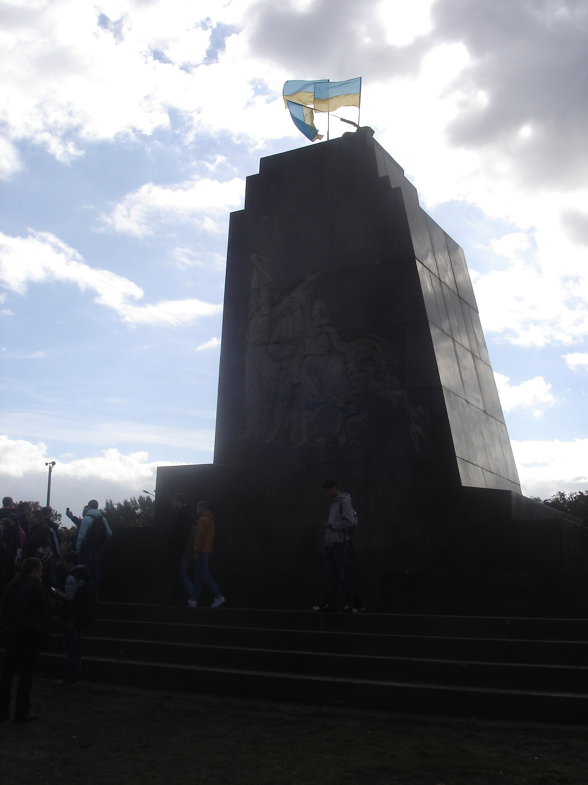 Постамент без статуї Леніну на майдані Свободи у Харкові з українськими прапорами, вставленими у чоботи статуї. 29.09.2014.